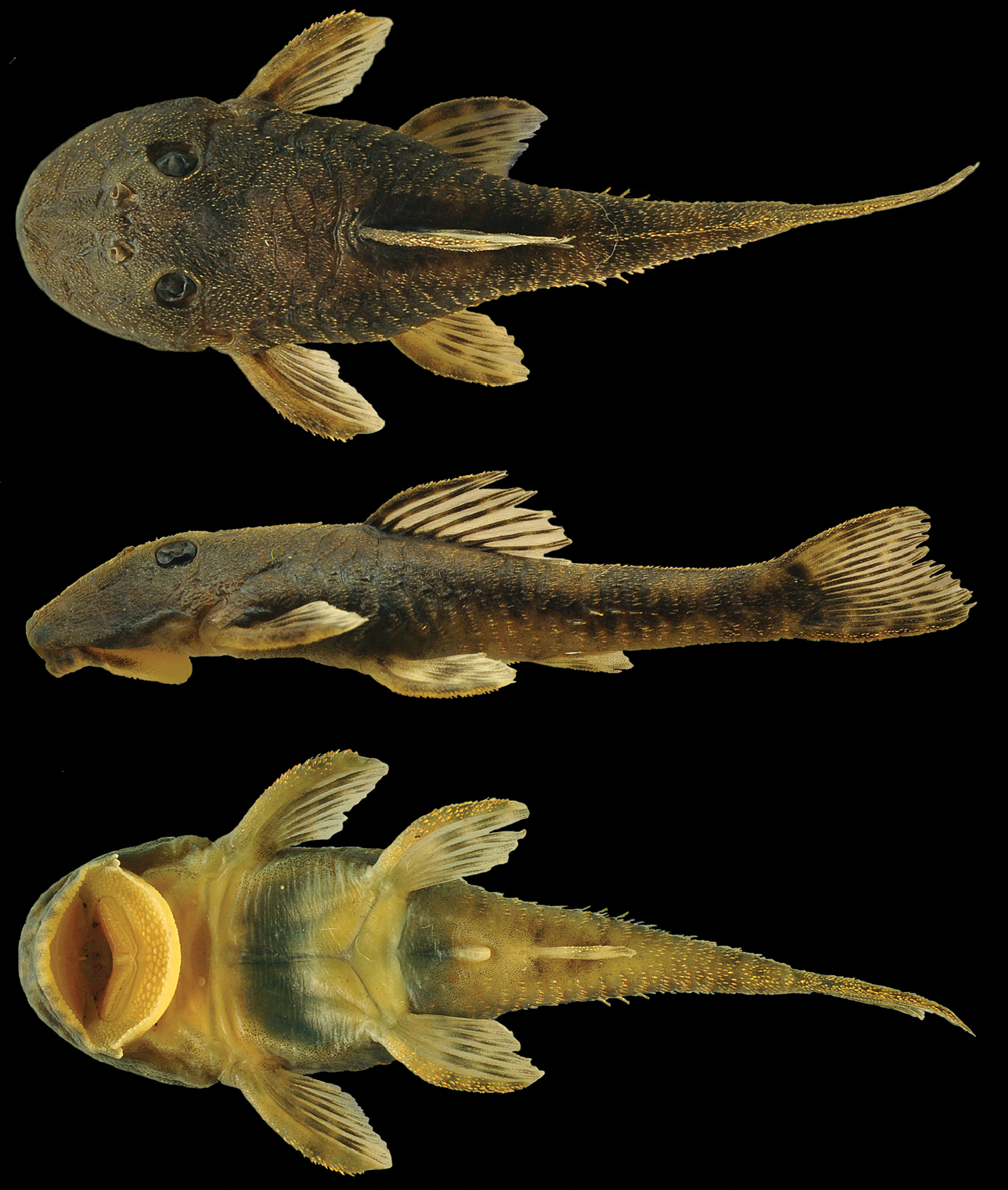 Microplecostomus forestii sp. n., holotipo, macho, 38.3 mm SL, Río Tocantins, Brasil. Silva GSC, Roxo FF, Luz E. Ochoa LE, Oliveira C (2016) Description of a new catfish genus (Siluriformes, Loricariidae) from the Tocantins River basin in central Brazil, with comments on the historical zoogeography of the new taxon. ZooKeys 598: 129-157.